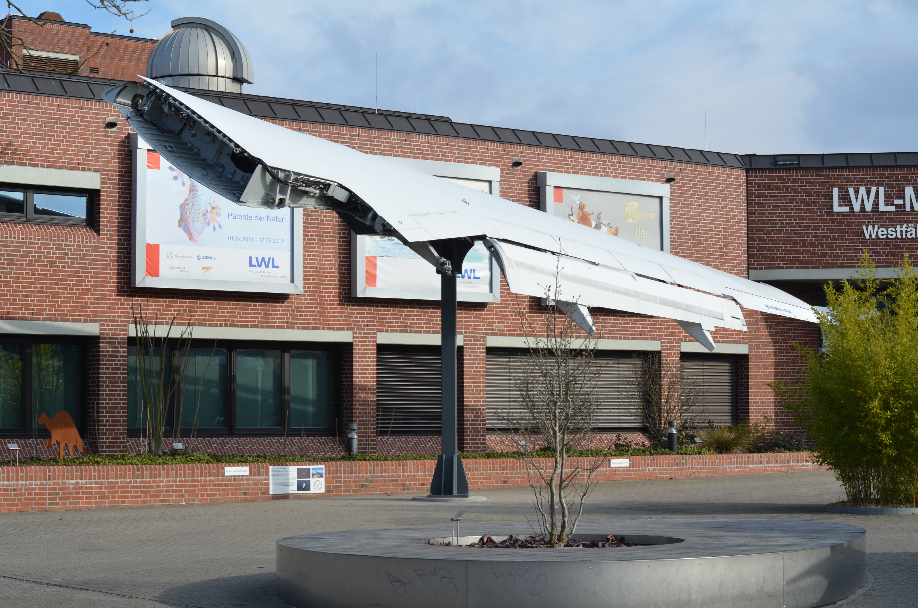 Flügel eines A 320 in der Bionik-Ausstellung des LWL Naturkundemuseums in Münster, 2012